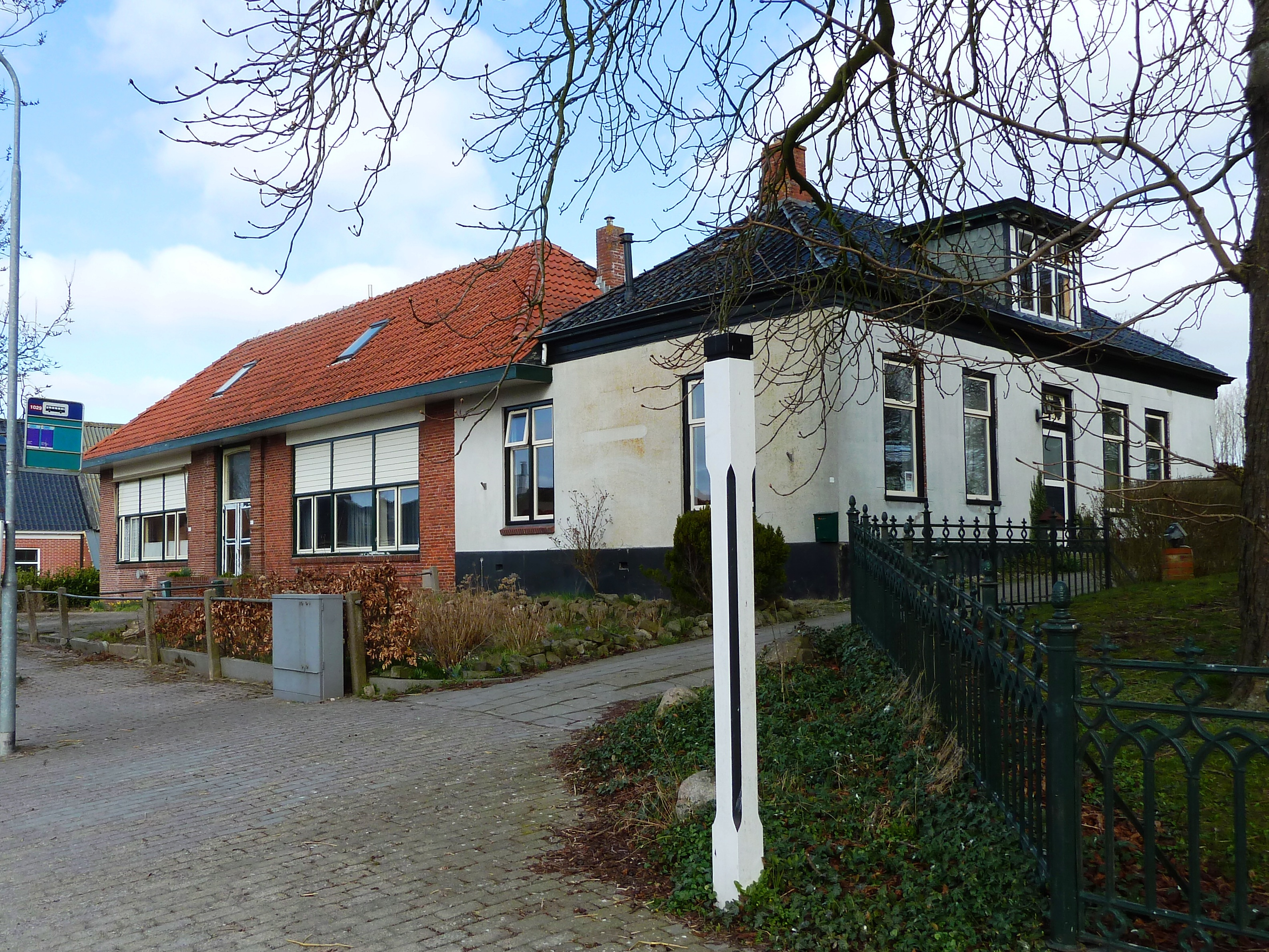 De oude school van Zuurdijk.